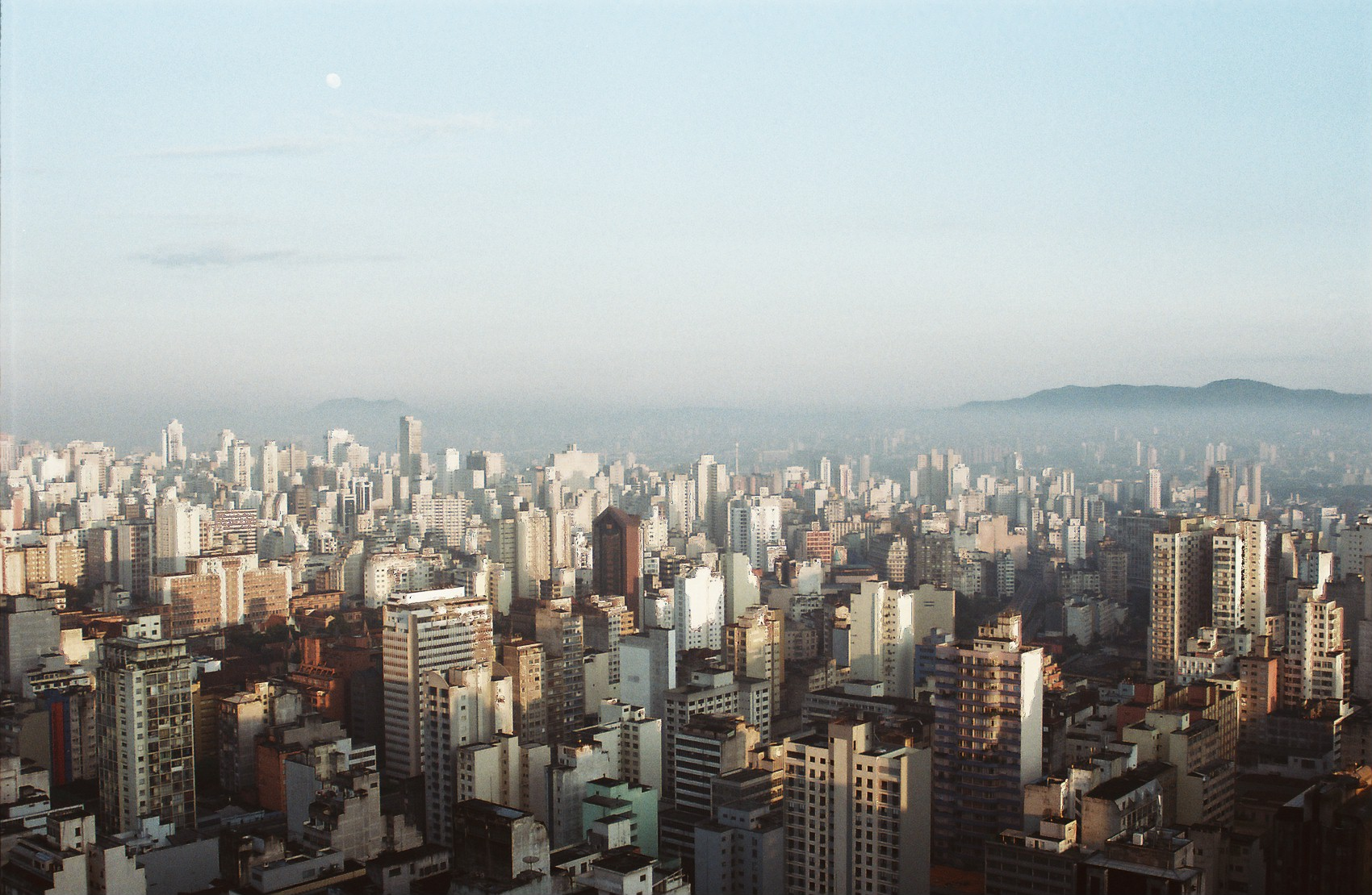 Do 31º andar do Edifício Copan, algumas imagens de São Paulo